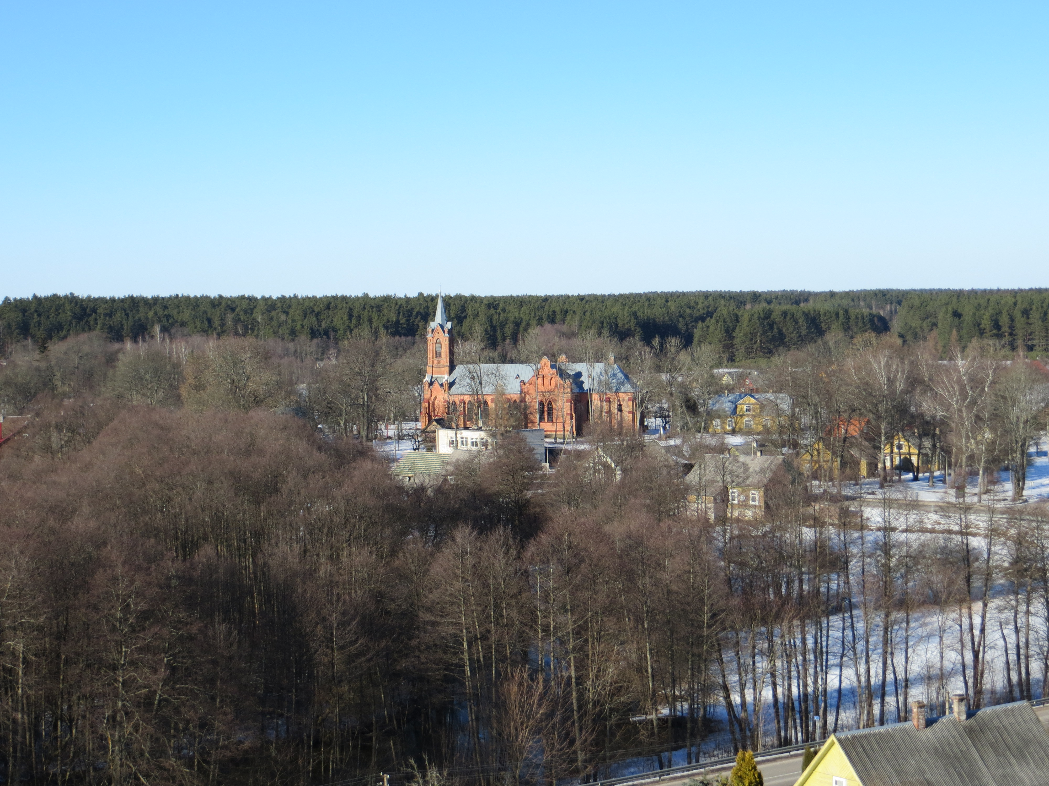 Kaltanėnai, Lithuania